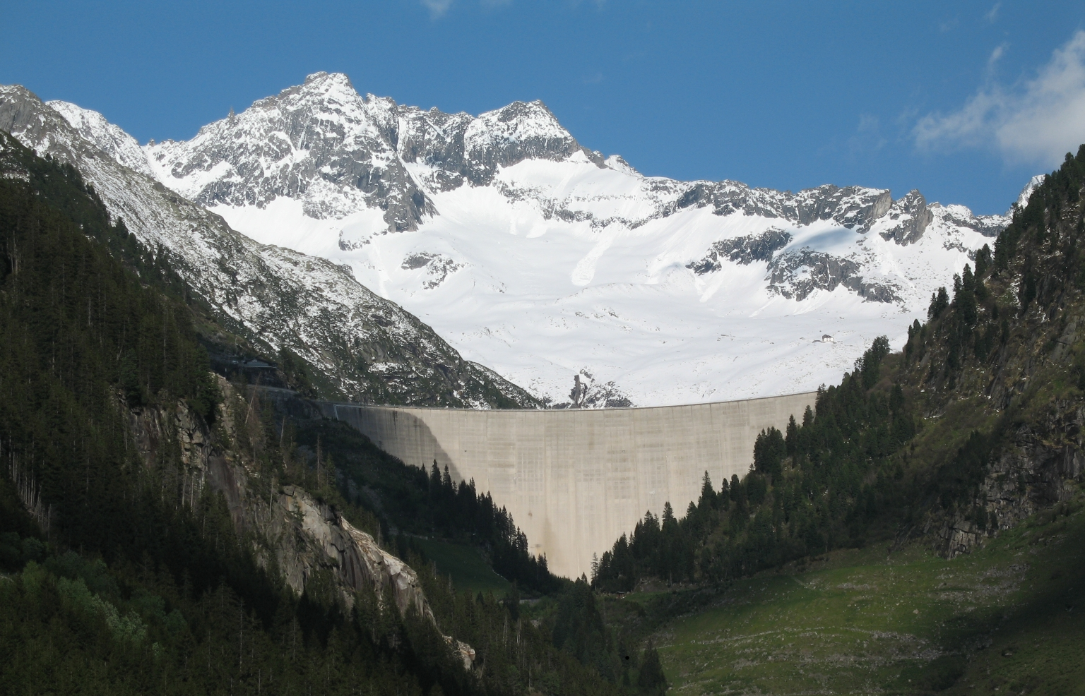 Staumauer des Staudammes Zillergründl in Tirol. Ansicht von Westen. Über dem rechten Ende der Staumauer die Plauener Hütte, dahinter die Westseite der Reichenspitzgruppe mit (v.l.n.r) Gamsscharte (2972m), Finger (markante Felsformation), Nördlicher Schwarzkopf (3082m/3079m), Südlicher Schwarzkopf (3045m/3042m).